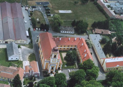 Nagyatád, Hungary, aerialphotography, Szent Kereszt római katolikus templom